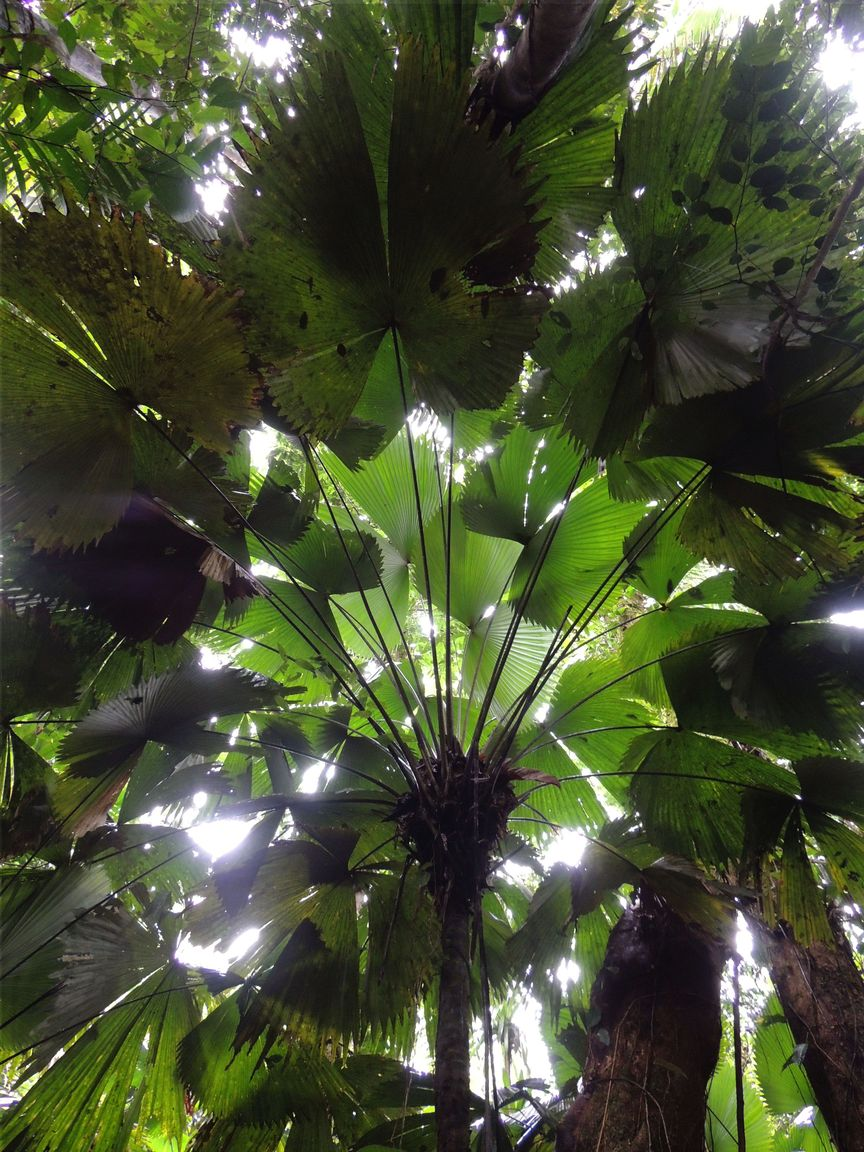 Hábito de Sabinaria magnifica